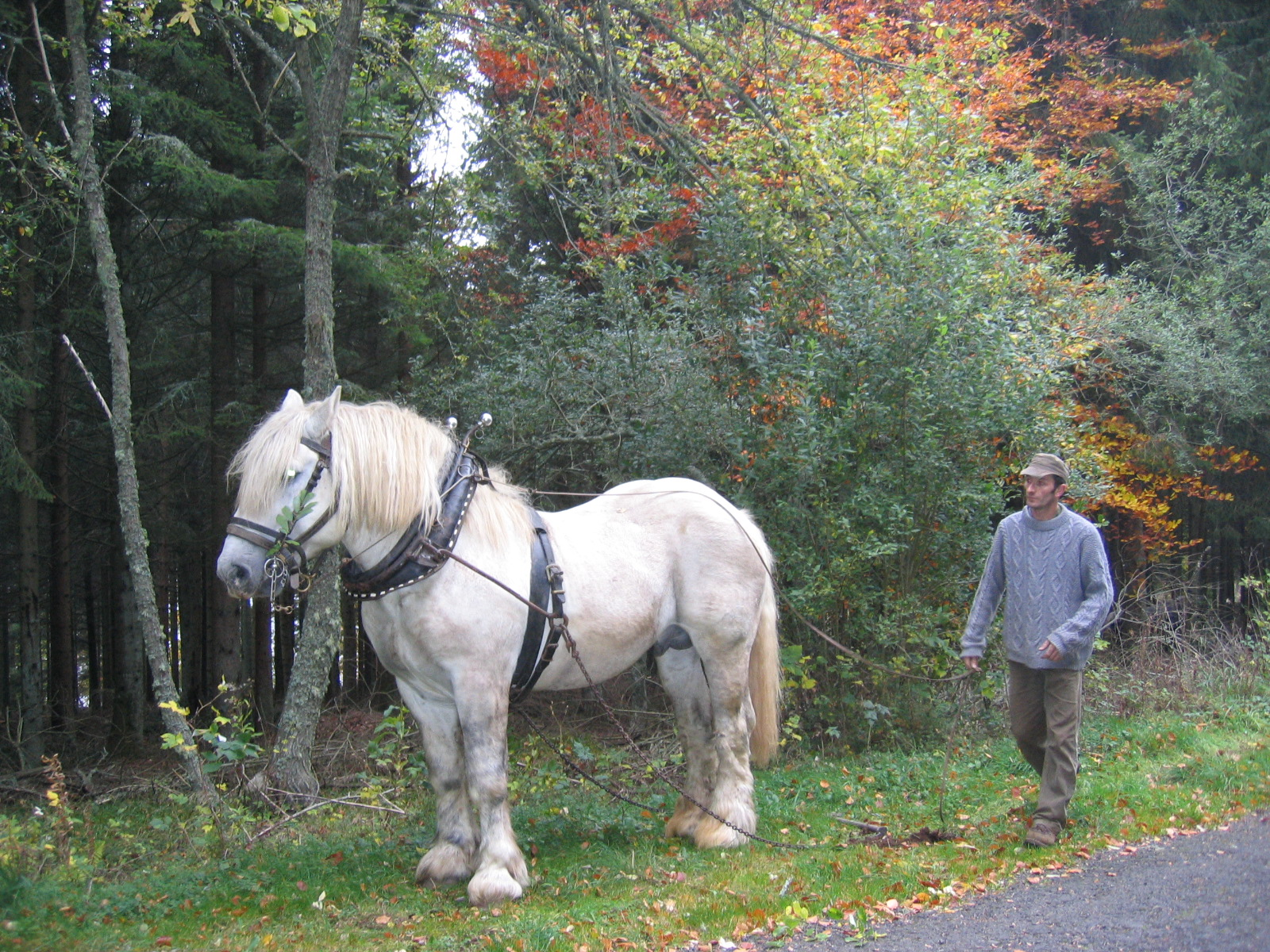 Le métier de débardeur se pratique encore à l'ancienne en Haute Loire dans les endroits où les tracteurs ne peuvent parvenir à cause de la pente. Les chevaux, très dociles et doux, sont admirablement éduqués pour tirer les lourds troncs d'arbres.